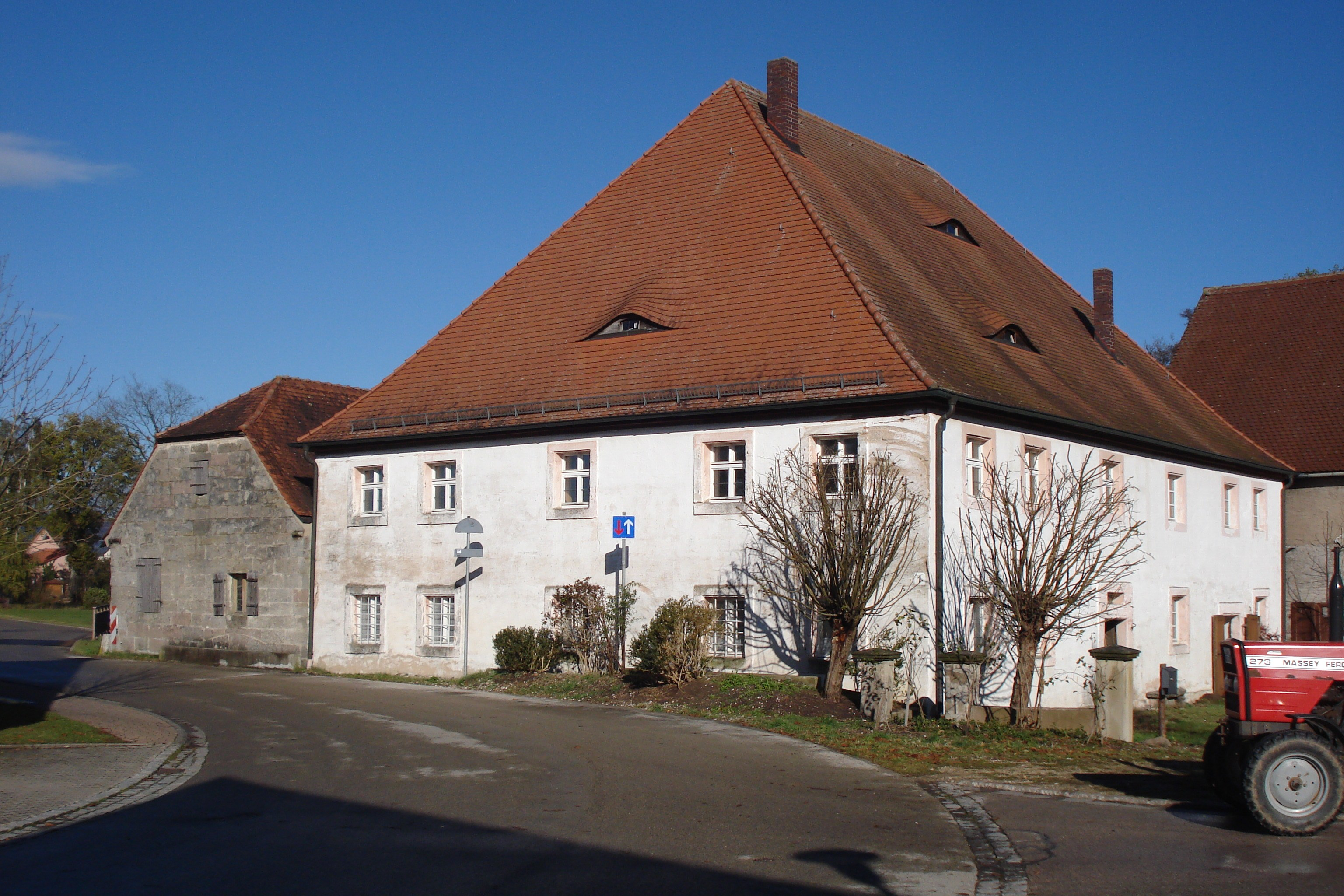 Die Heinersdorfer Mühle von 1764 mit dem sog. Sägehaus ( links ).